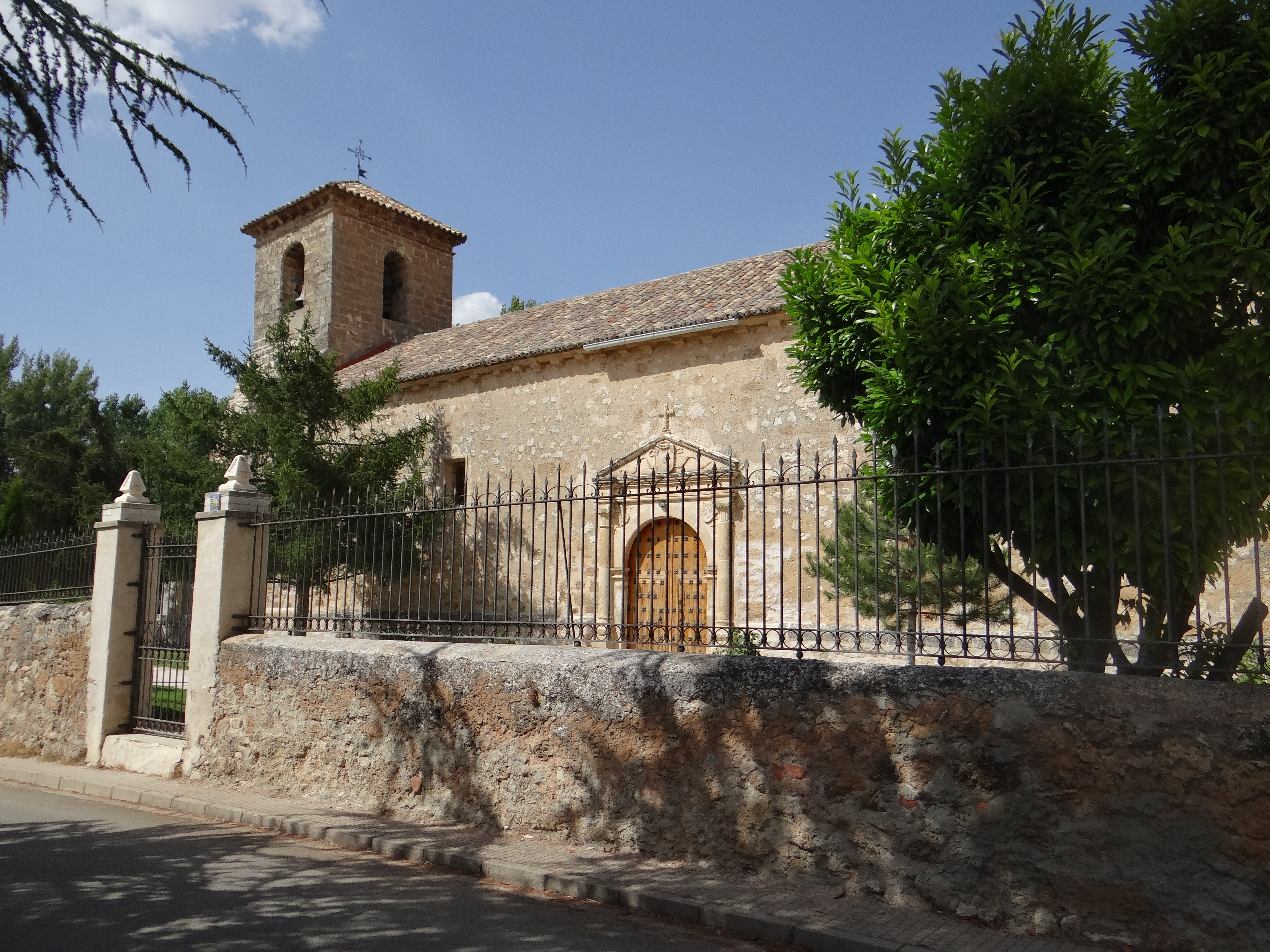 Exterior Parroquia de Mandayona